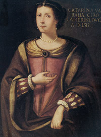 Luigi Valeri: ritratto di Caterina Cybo, sec. XVIII